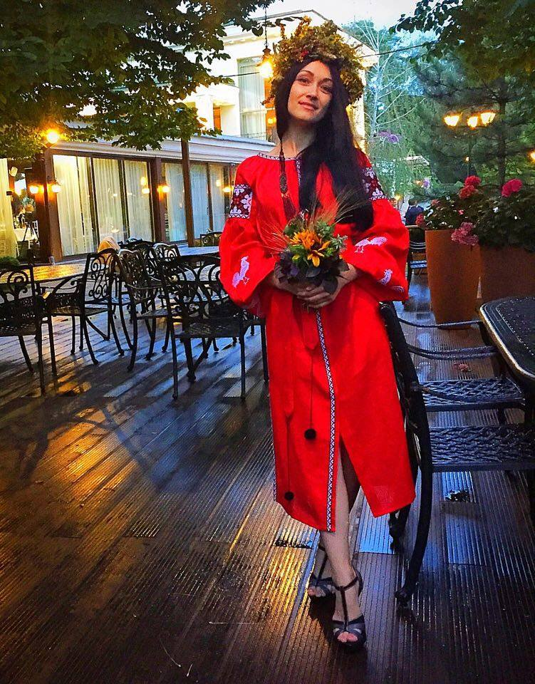 українська співачка Іванка Червінська